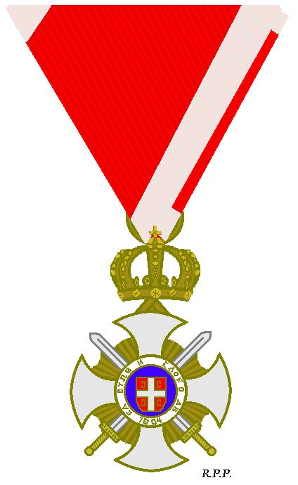 Ridderkruis Orde van Karageorge met zwaarden 1914-1918 of 1941-1945 in Londen. Met het oorlogslint. Servië